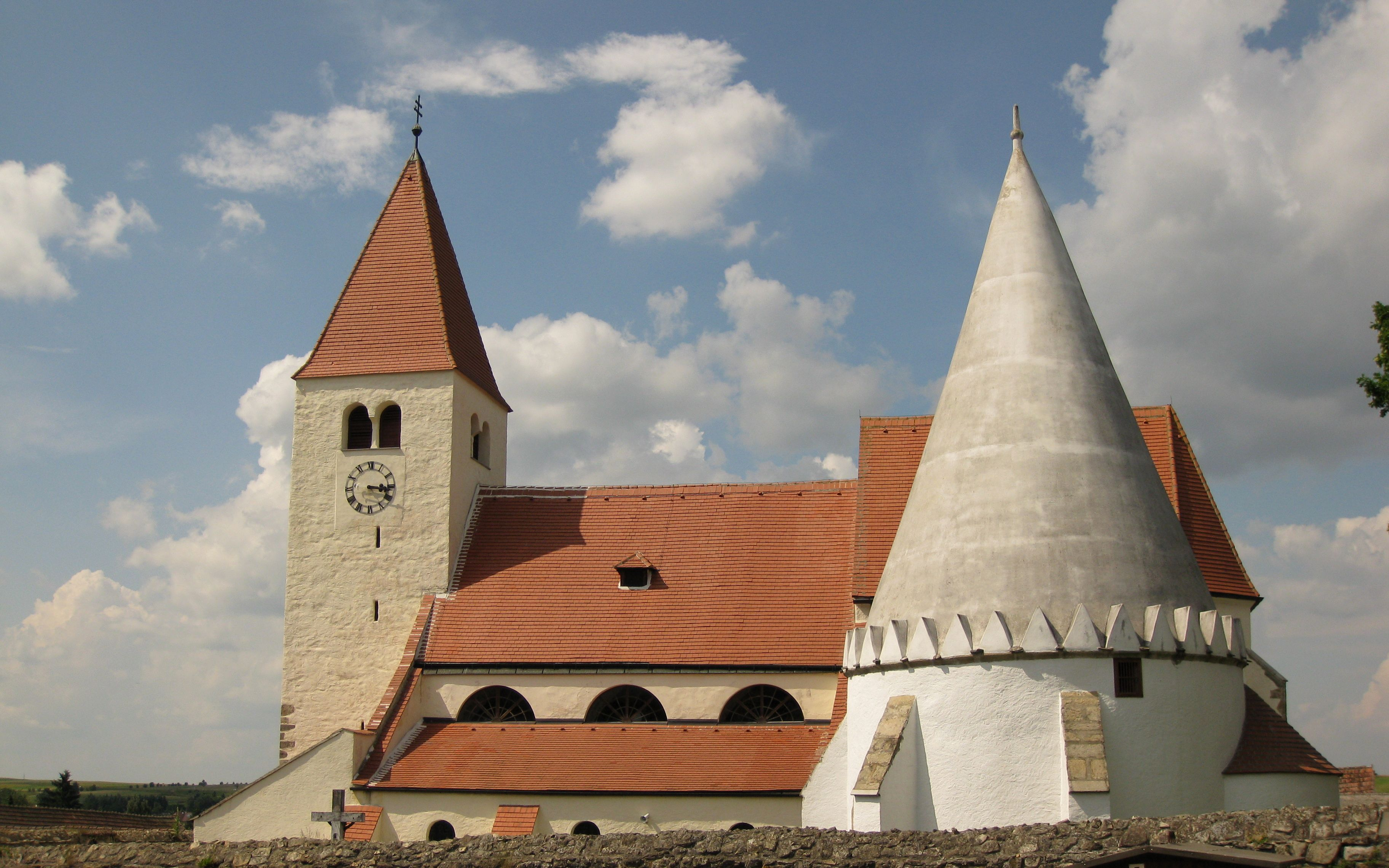 Kath. Pfarrkirche hl. Lorenz und Friedhof